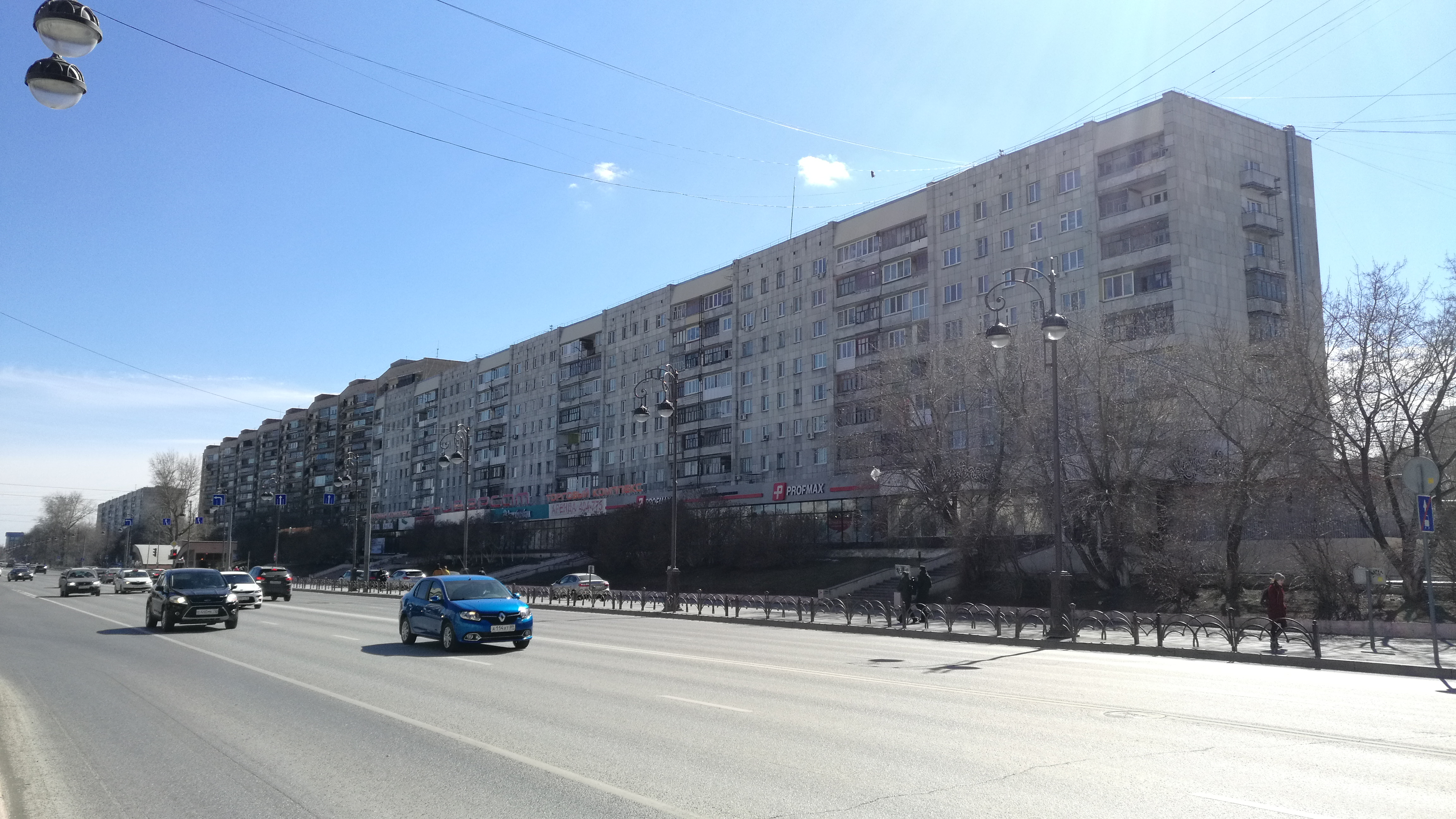 Strato Respubliko. Tjumeno, Rusio.